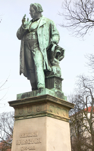 Statue of Heinrich Marschner, Hannover, Georgstraße